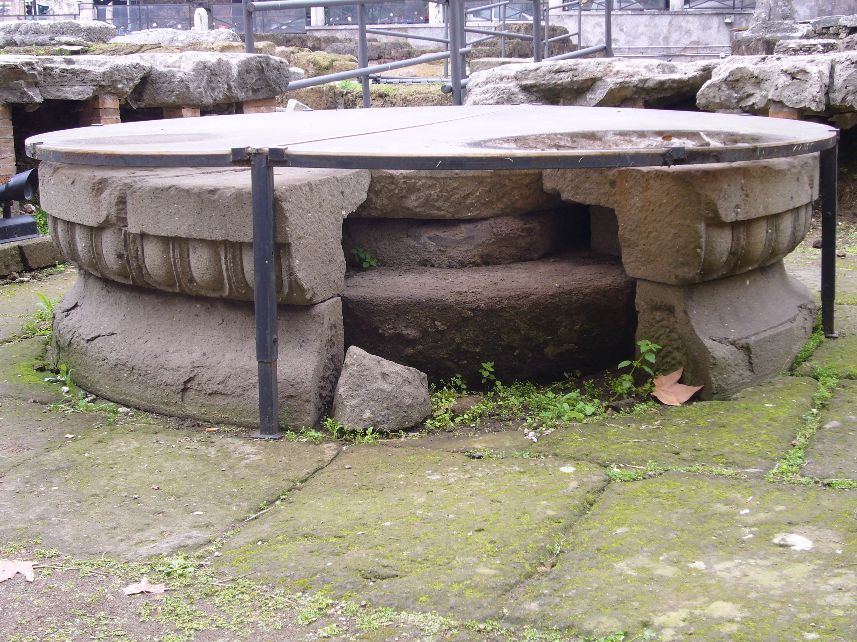 Autel des offrandes devant les temples à Fortuna et Mater Matuta sur l'aire sacrée de Sant'Omobono (Rome, Latium, Italie).